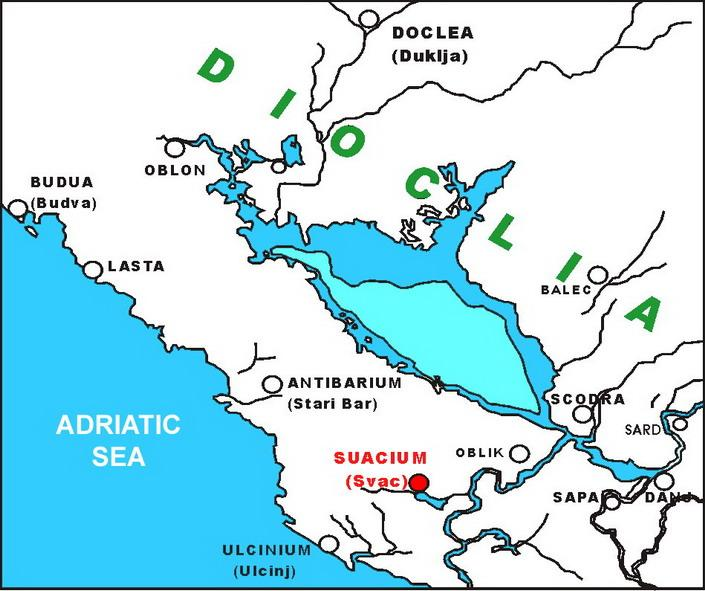 Suacium (XI c AD)